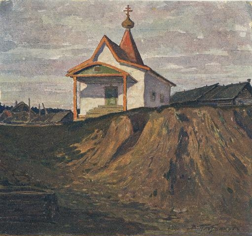 Часовня в Поморье Архангельской губернии. Открытка Общества возрождения художественной Руси.